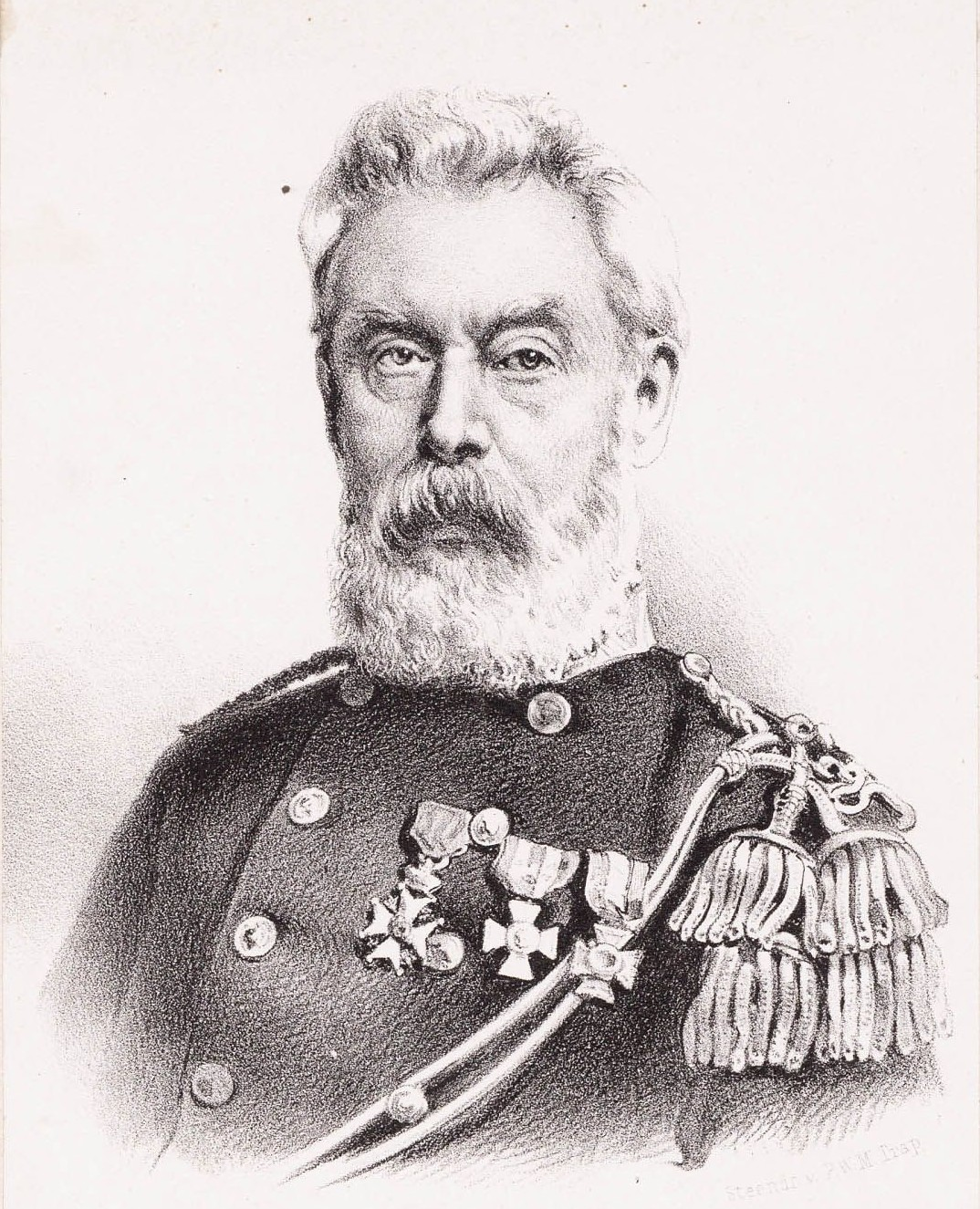 Plaats: Alkmaar Beschrijving: Borststuk van voren van de in Alkmaar geboren minister van oorlog Hendrik Johannes Enderlein. In uniform met militaire onderscheidingen. Datering: 1899 Deelcollectie: Collectie Regionaal Archief Alkmaar Vervaardiger naam: Trap, P.W.M. Rechthebbende naam: Geen Annotatie: Opgeplakt op een vel van 261 x 204 waarop in de hand van Bruinvis "Geboren te Alkmaar 7 maart 1821". Hij overleed te Den Haag op 28 dec 1898. Lit: NNBW II, 437. AC 1899, nr 1. Bruinviscatalogus nr. 877 Onderwerp: Enderlein, H.J.